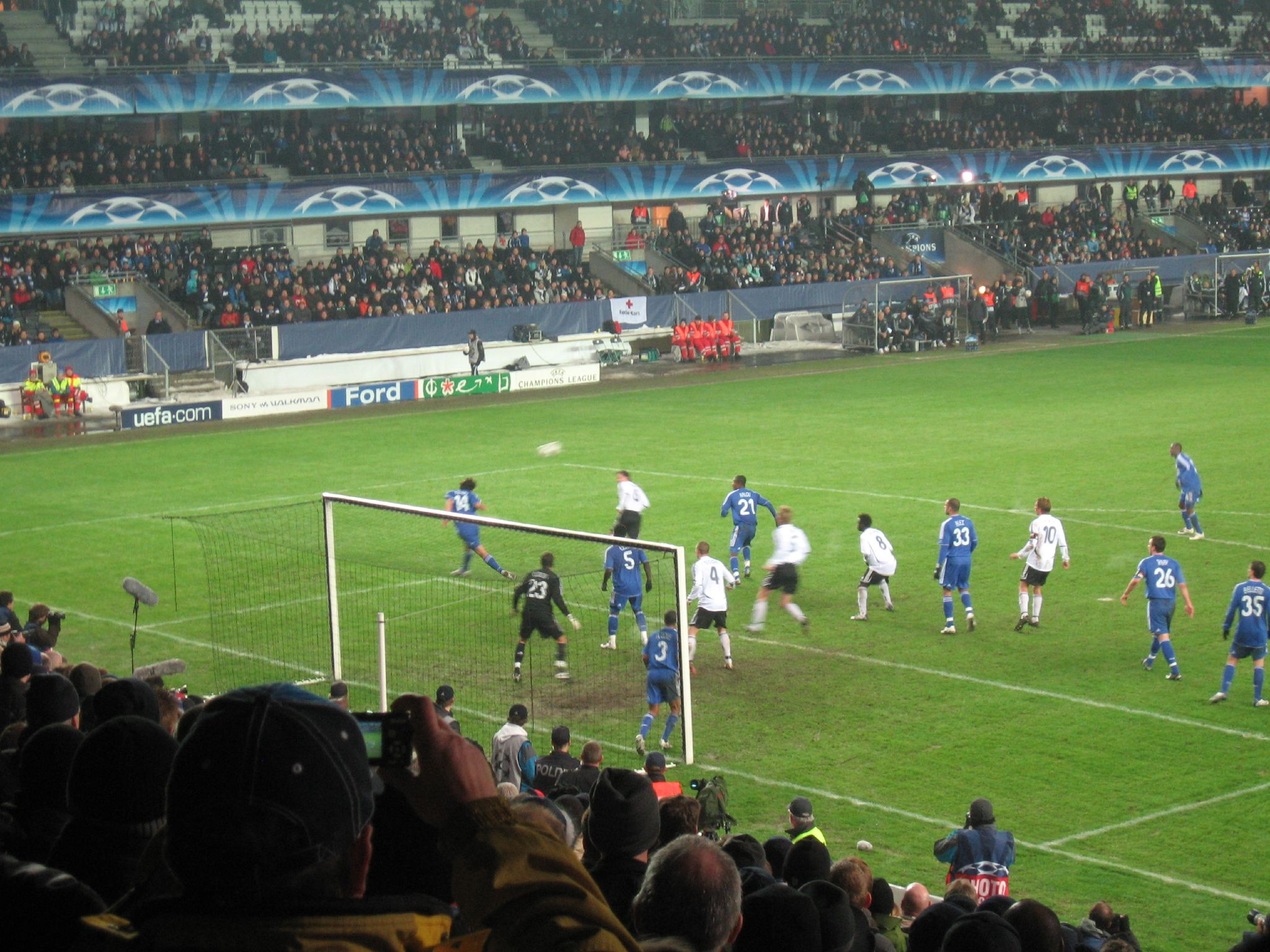 rosenborg (0) v CHELSEA (4) - 28/11/07